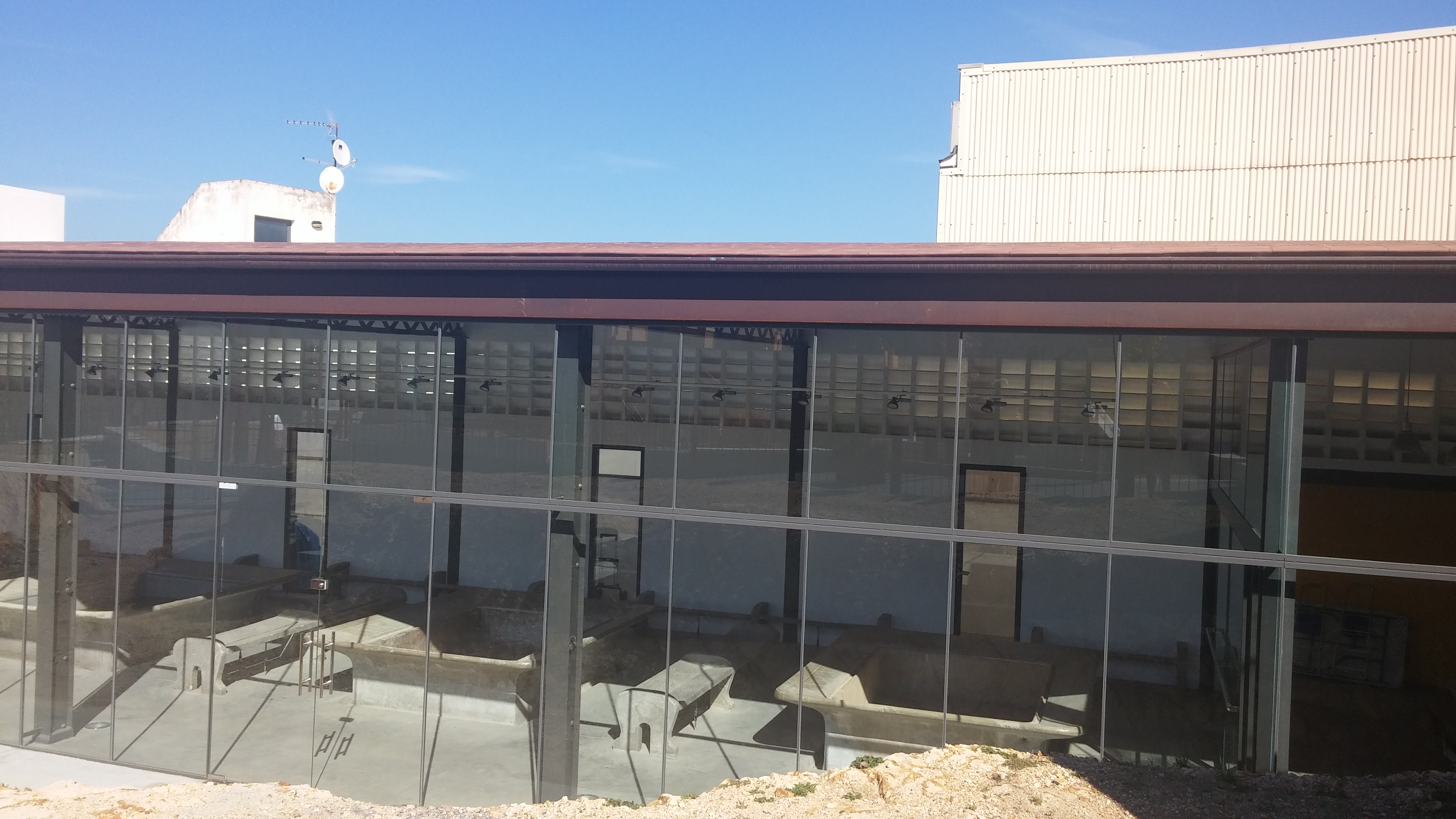 Safareigs del Puig. Sant Feliu de Guíxols